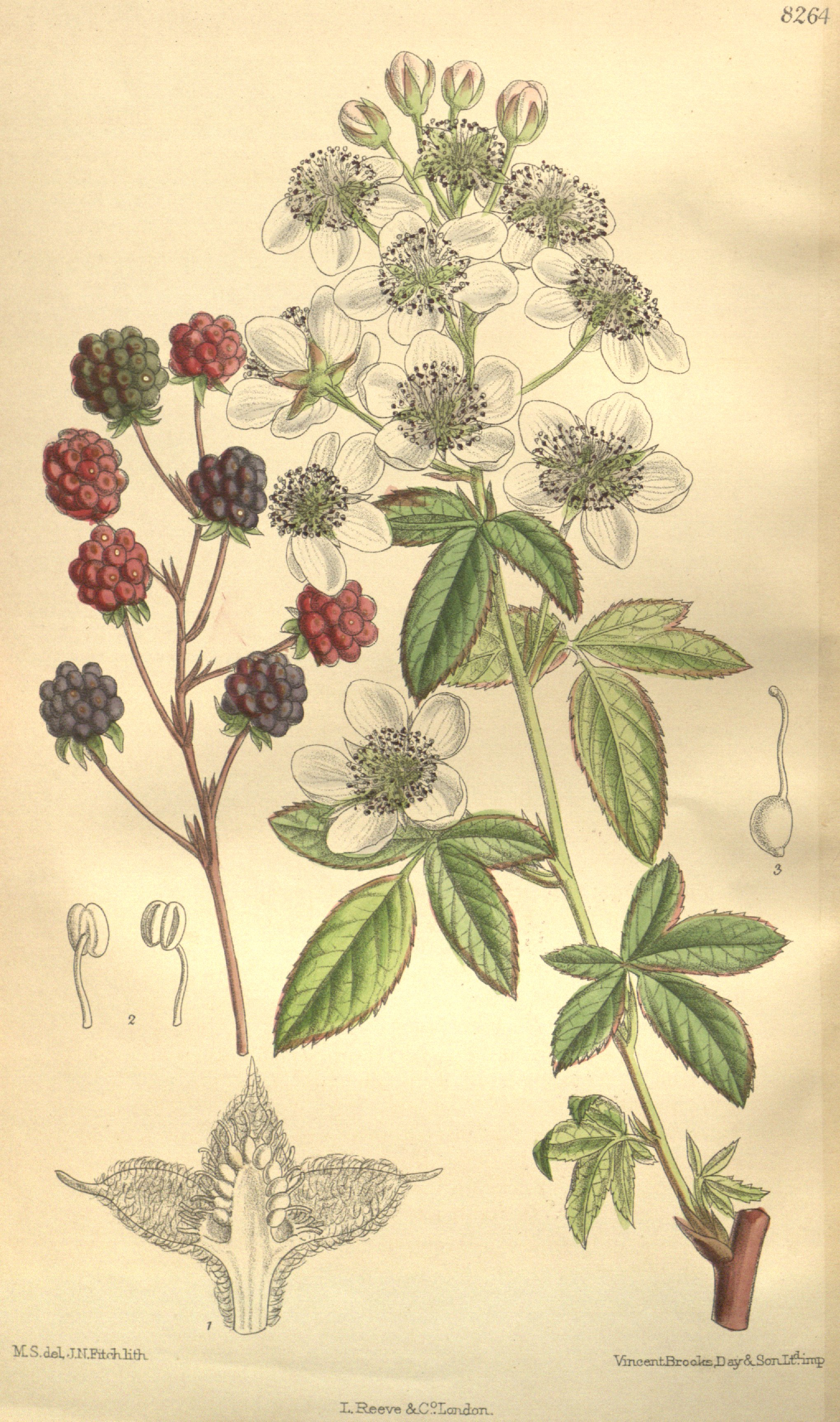 Rubus canadensis, Rosaceae